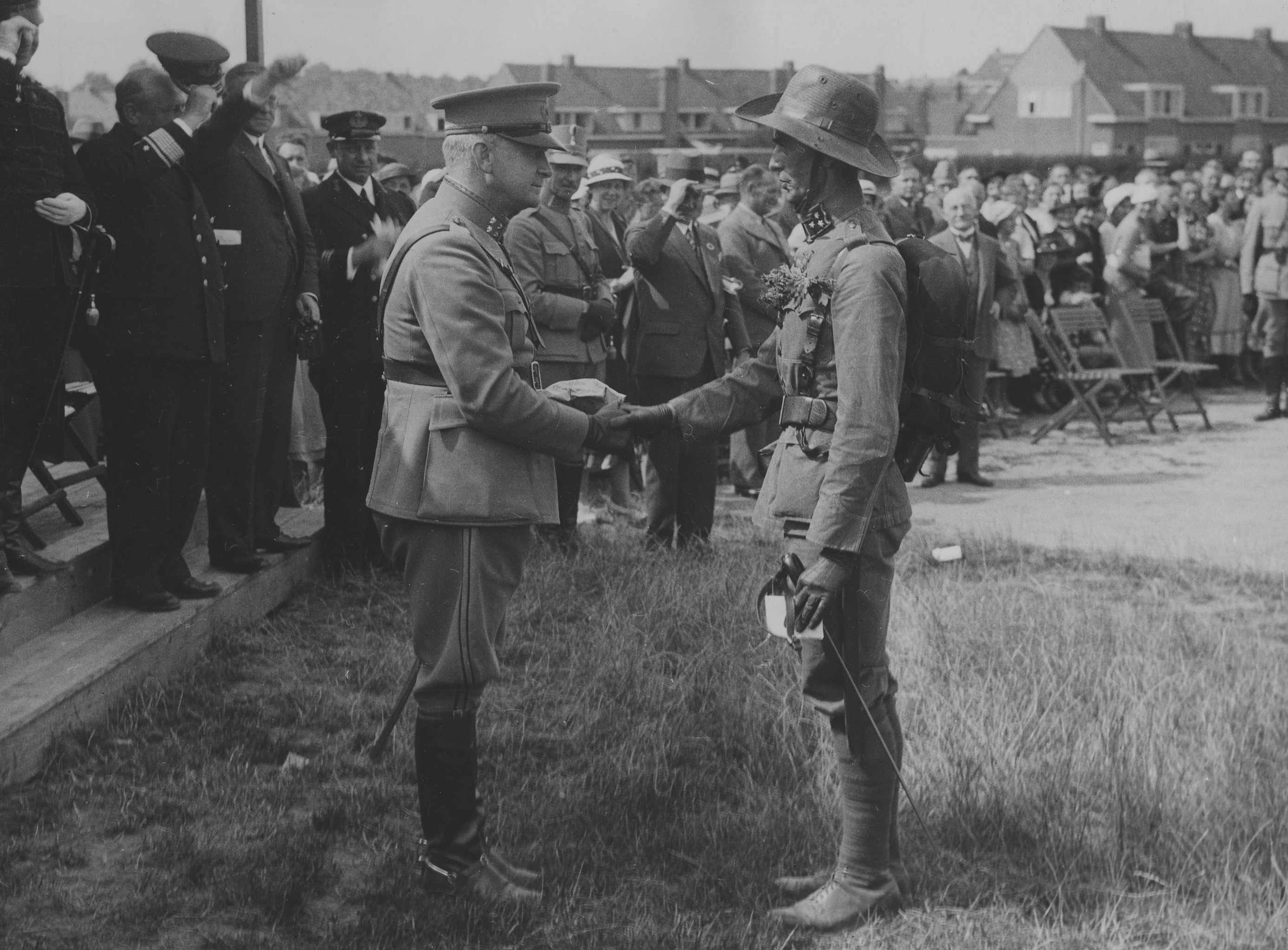 De commandant van het detachement Koloniale Reserve, de kapitein L.A. van den Berge, ontvangt gelukwensen van generaal Fabius op het Molenveld op de vierde dag van de 25e Vierdaagse.